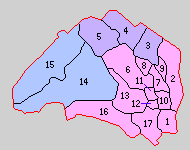 神奈川県愛甲郡の町村。